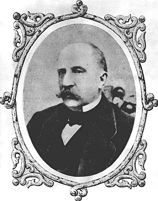 Portret Tytusa Woyciechowskiego, polskiego przemysłowca, mecenasa sztuki, szkolnego kolegi i serdecznego przyjaciela Chopina z lat młodzieńczych. Reprodukcja fotograficzna, niesygnowana, II poł XIX w.